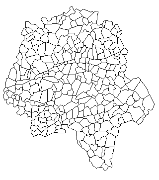 Cartes des communes d'Indre-et-Loire